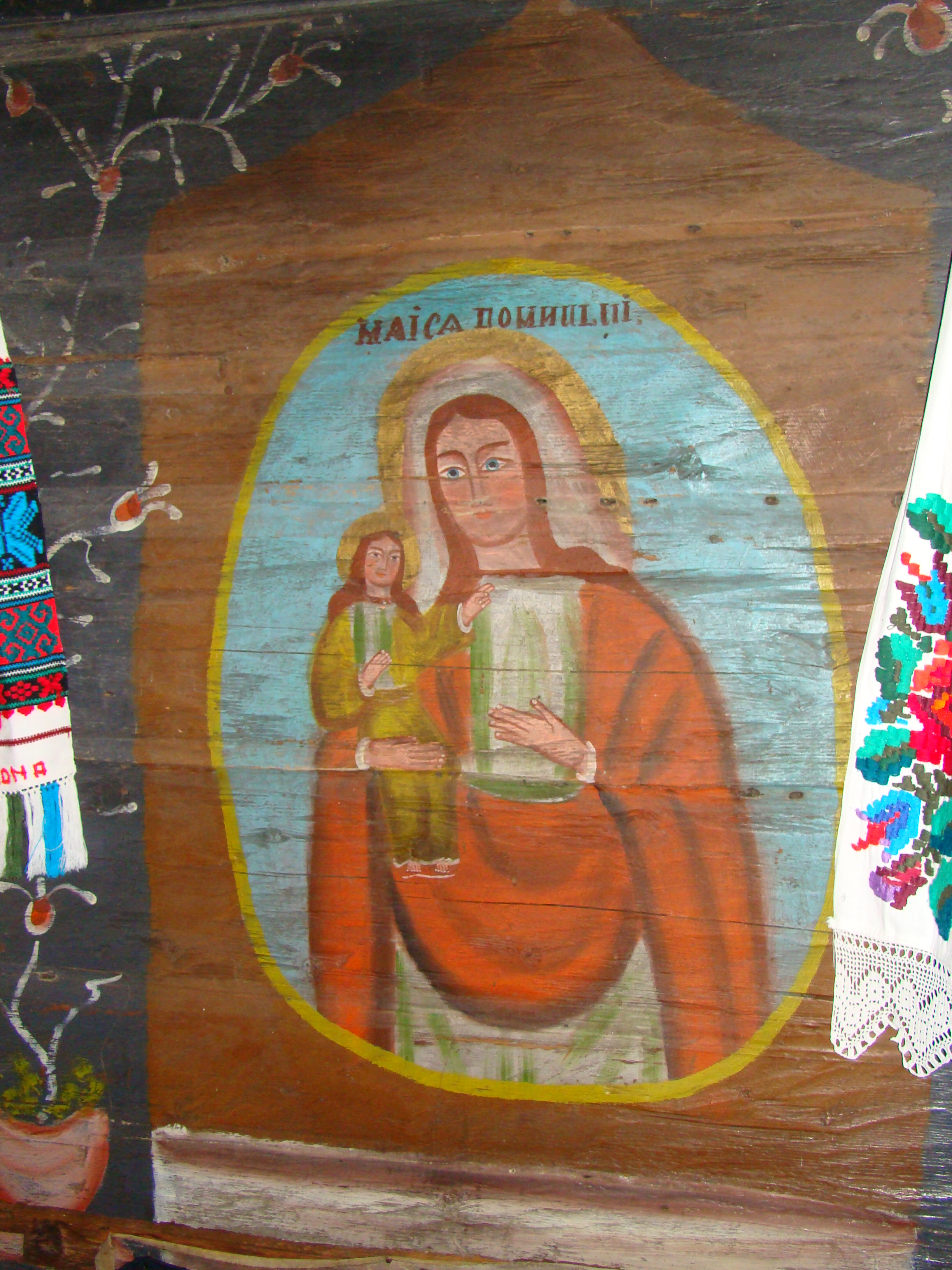 Biserica de lemn din Poiana Botizii-interioare